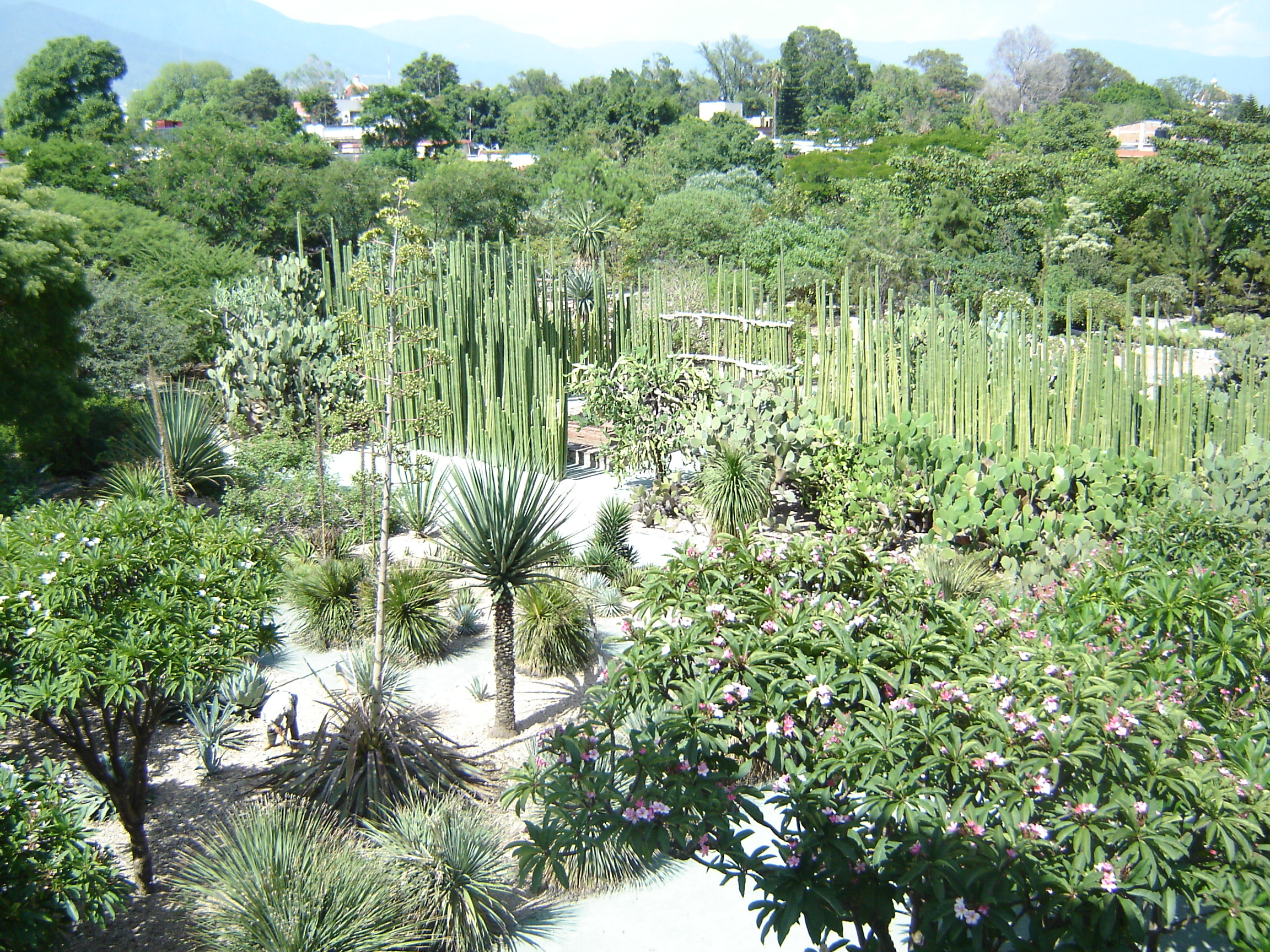 Jardín Etnobotánico de Oaxaca